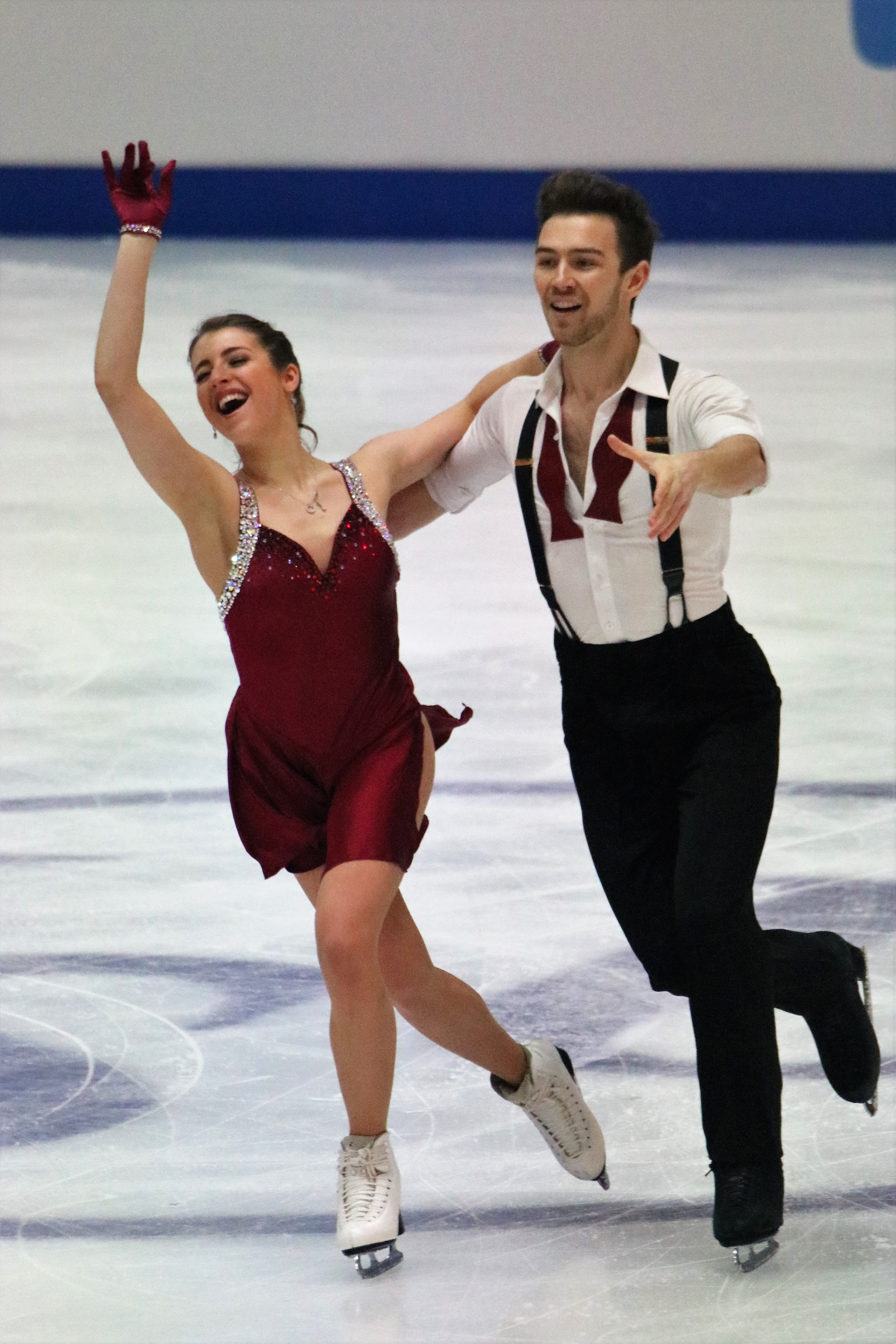 Робин Твидейл и Джозеф Бакленд (Великобритания) на чемпионате Европы по фигурному катанию 2020